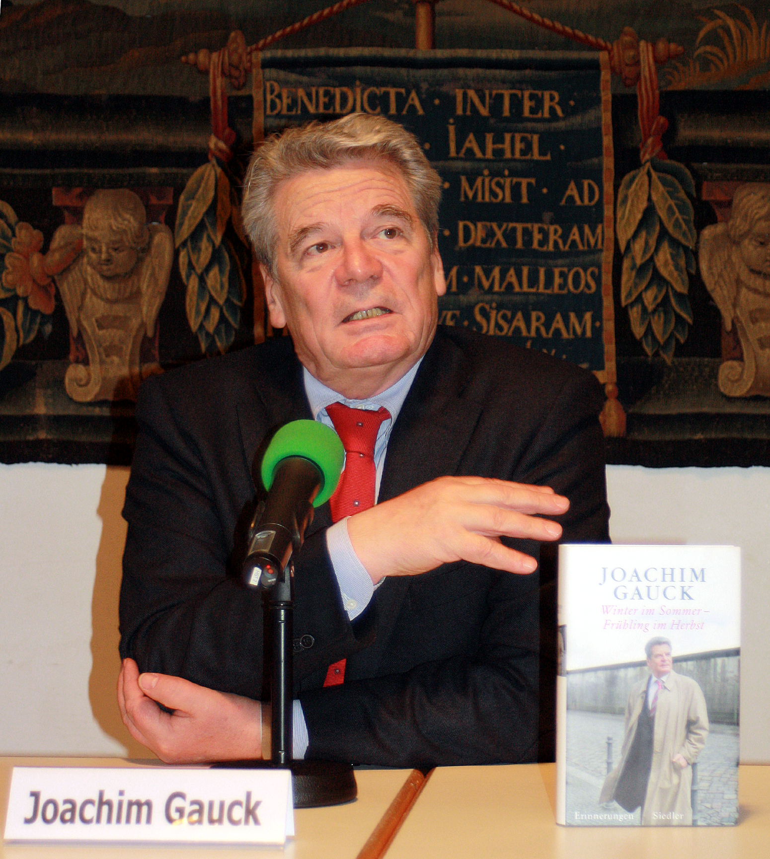 Joachim Gauck, deutscher evangelischer Pastor, kandidierte im Jahr 2010 erfolglos für das Amt des Präsidenten der Bundesrepublik Deutschland. Hier am 29.11.2010 in München.